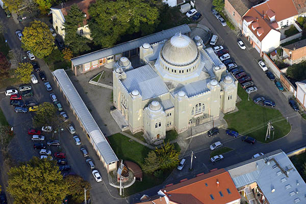 Gyöngyös Zsinagóga